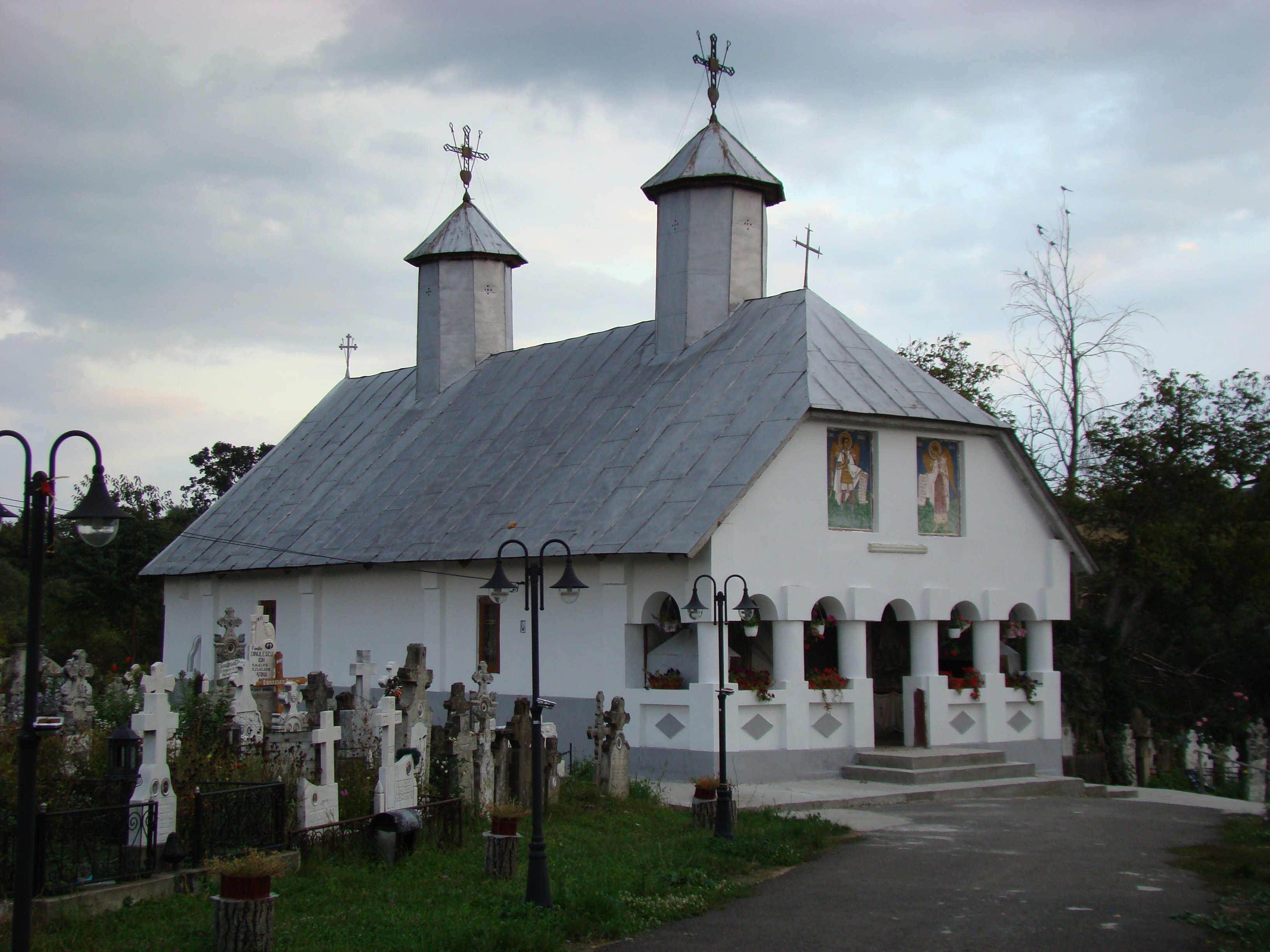 Biserica ortodoxă din Poienari, județul Gorj